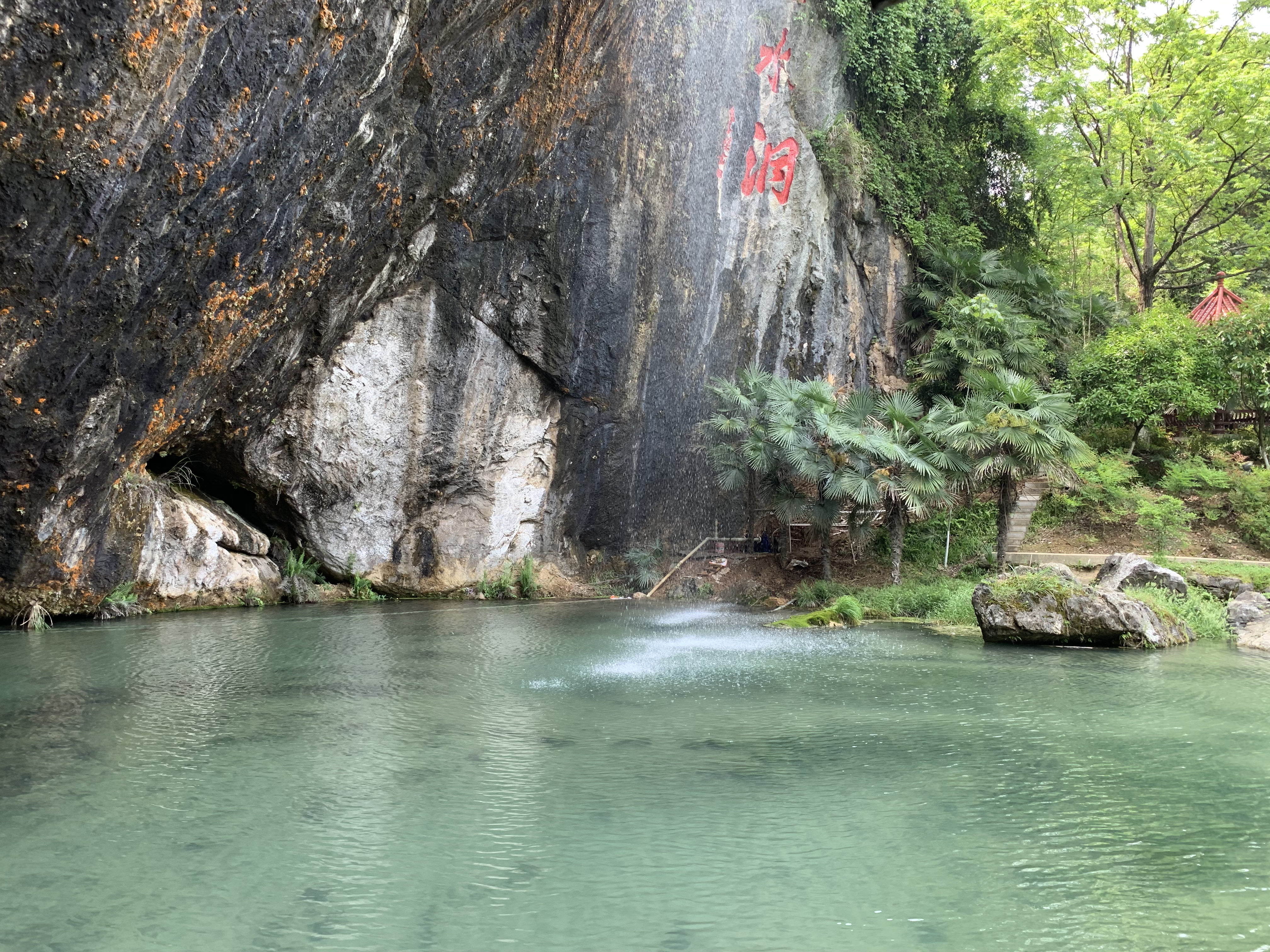 通山县隐水洞地质公园，隐水洞刻字和地下河入口的池塘。